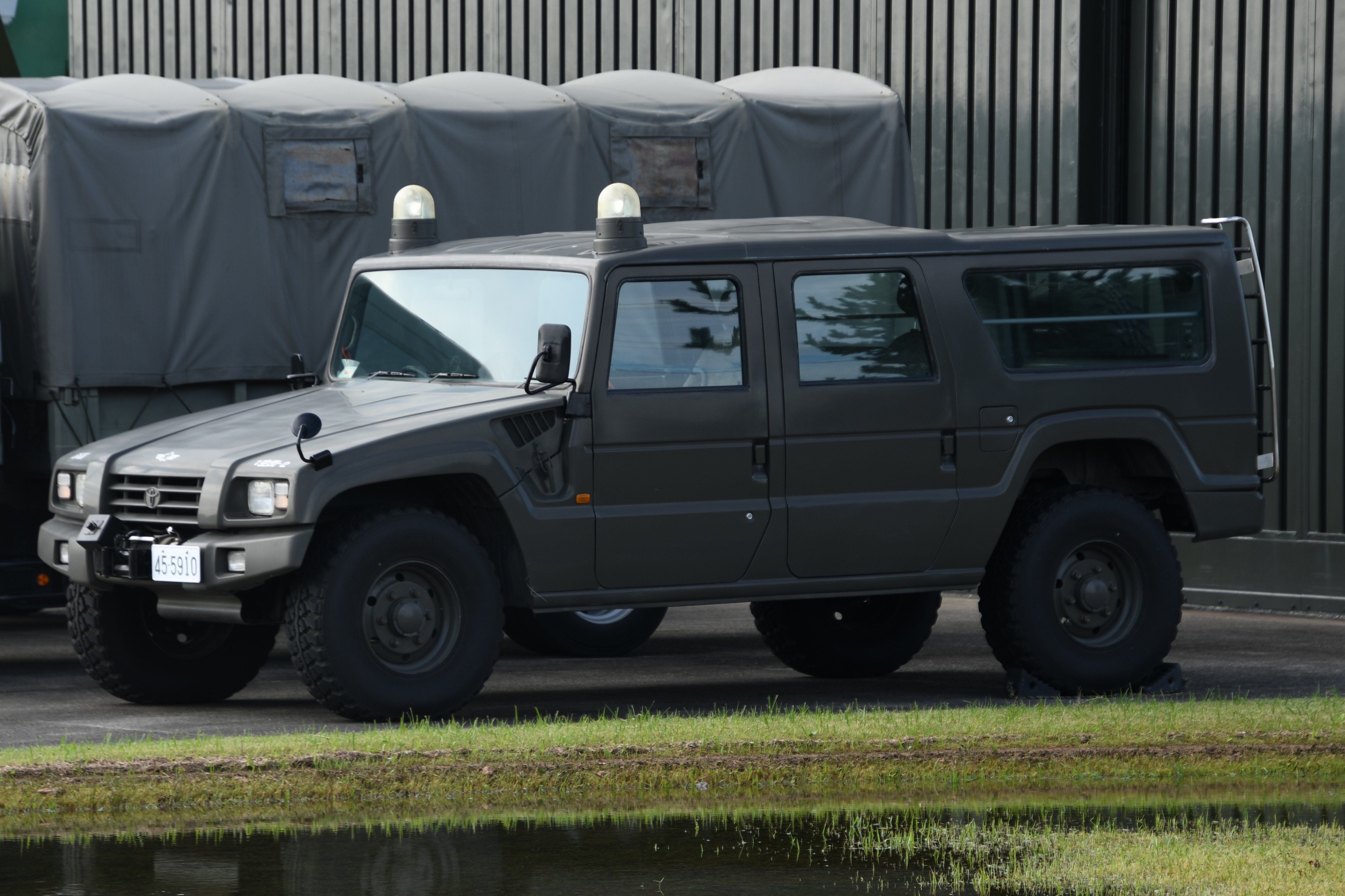 航空自衛隊 場外救難車Ⅰ型（トヨタ・メガクルーザー、45-5910号車） 左前面。2019年10月20日 浜松基地にて。